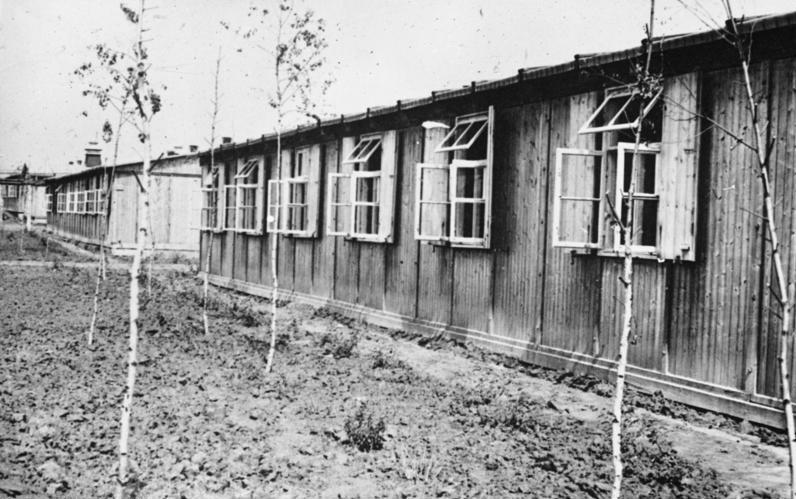 28 Barackenlager mit Vorgarten